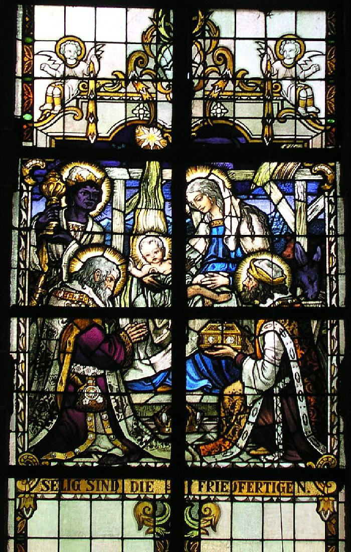 Trittenheim an der Mosel, Bleiglasfenster im Nazarenerstil (1923) in der katholischen Pfarrkirche "St. Clemens" Matthäus 5,9 Selig, die Frieden stiften; denn sie werden Söhne Gottes genannt werden. Aus den Jahren 1920/21 stammen die größtenteils noch originalen neoromanisch gehaltenen Glasfenster der Firmen Binsfeld-Dornoff (Trier; 3., 5., 7. und 8. Seligpreisung)